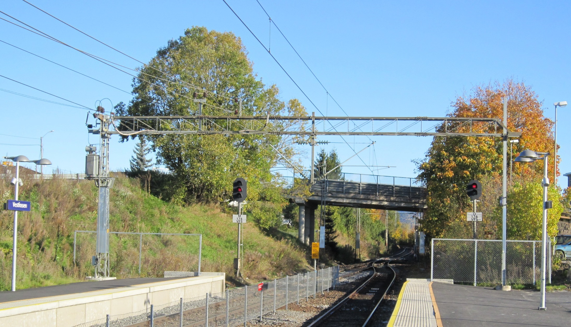 Fylkesvei 68 krysser Sørlandsbanen på nordsiden av Vestfossen stasjon.